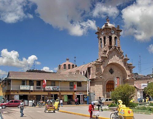 Runa Simi: uj hatun inlisya Aymar aru: maa inlisya